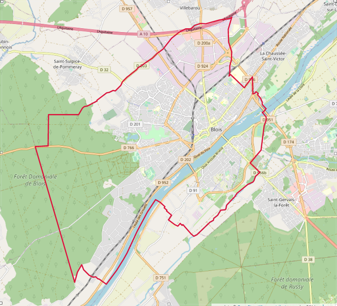 carte réalisée sur umap This map may be incomplete, and may contain errors. Don't rely solely on it for navigation.